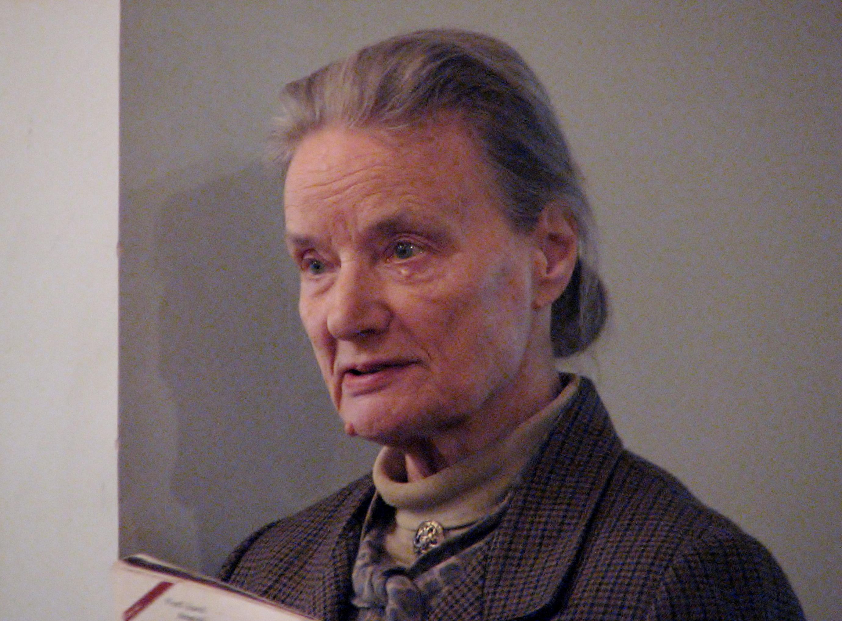 Lea Tormis Eesti Teatriliidus raamatuesitlusel